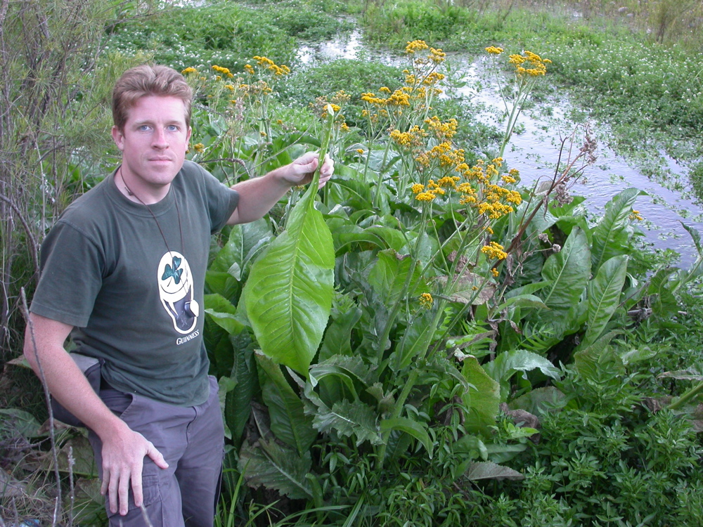 Senecio fistulosus